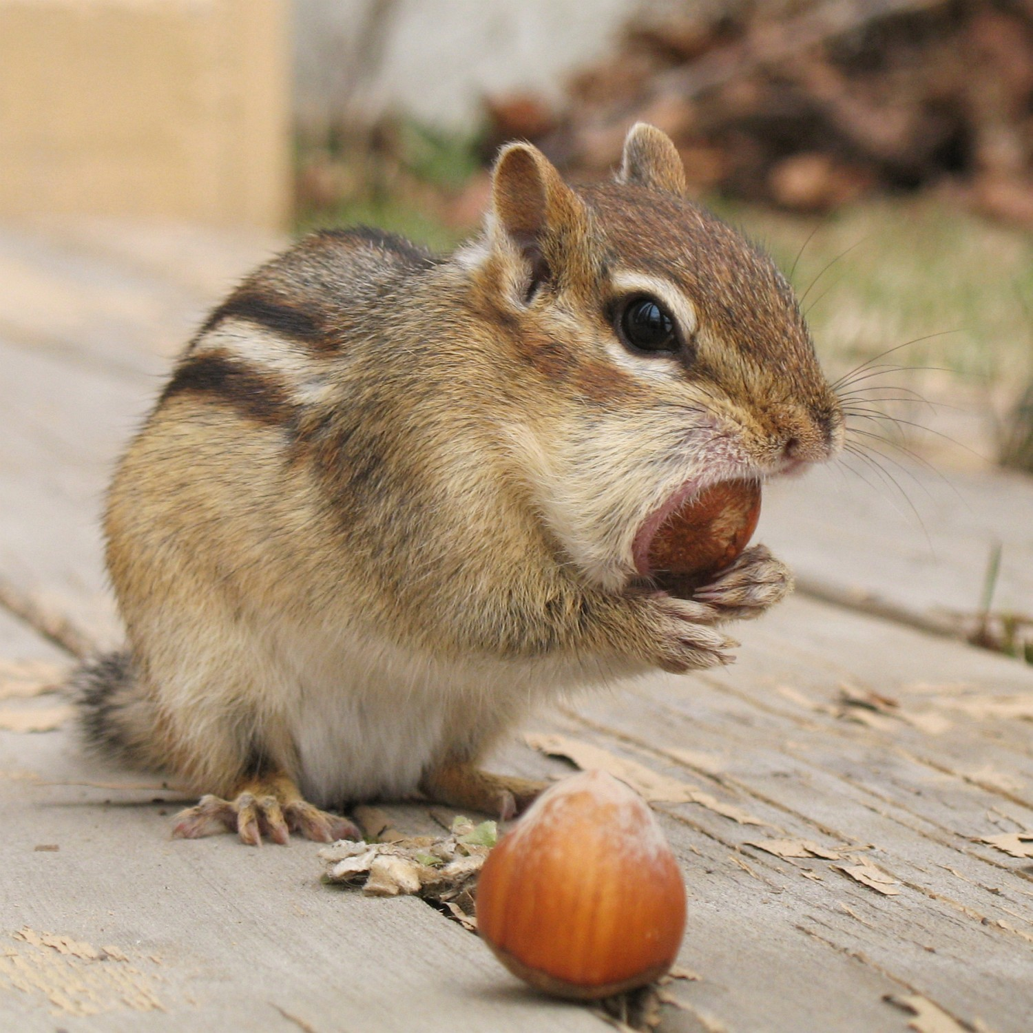 Tamias striatus. Bas-Saint-Laurent, Province de Québec, Canada.